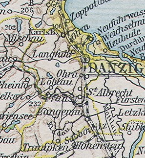 Kreis Danziger Höhe, Ausschnitt aus